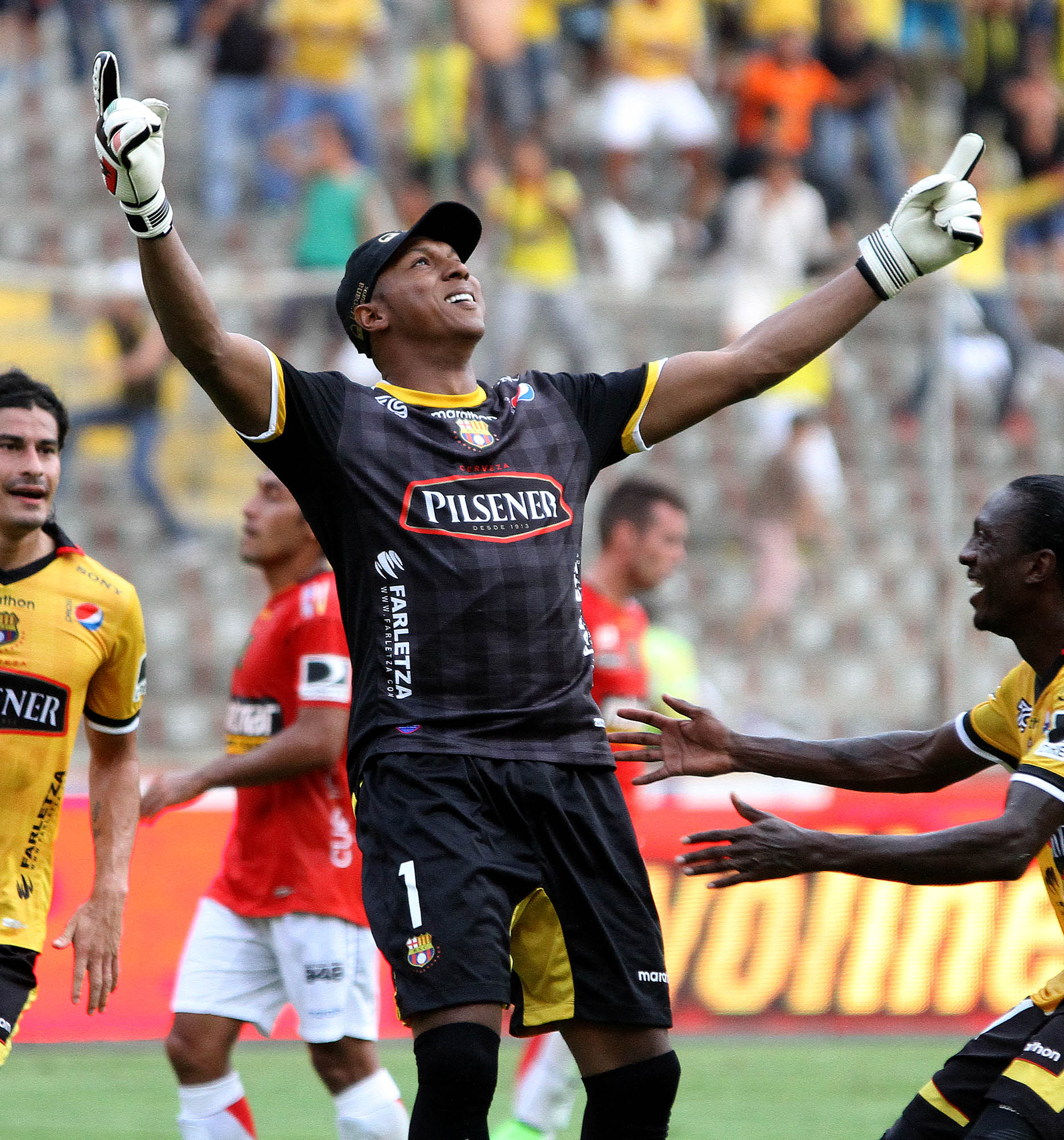 Guayaquil, 15 denoviembre del 2014 El portero del Barcelona Máximo Banguera dedicó a su madre recientemente fallecida el gol anotado desde el tiro penal ante el Deportivo Cuenca en el partido jugado en el estadio Monumental por la décima sexta fecha del campeonato nacional de fútbol